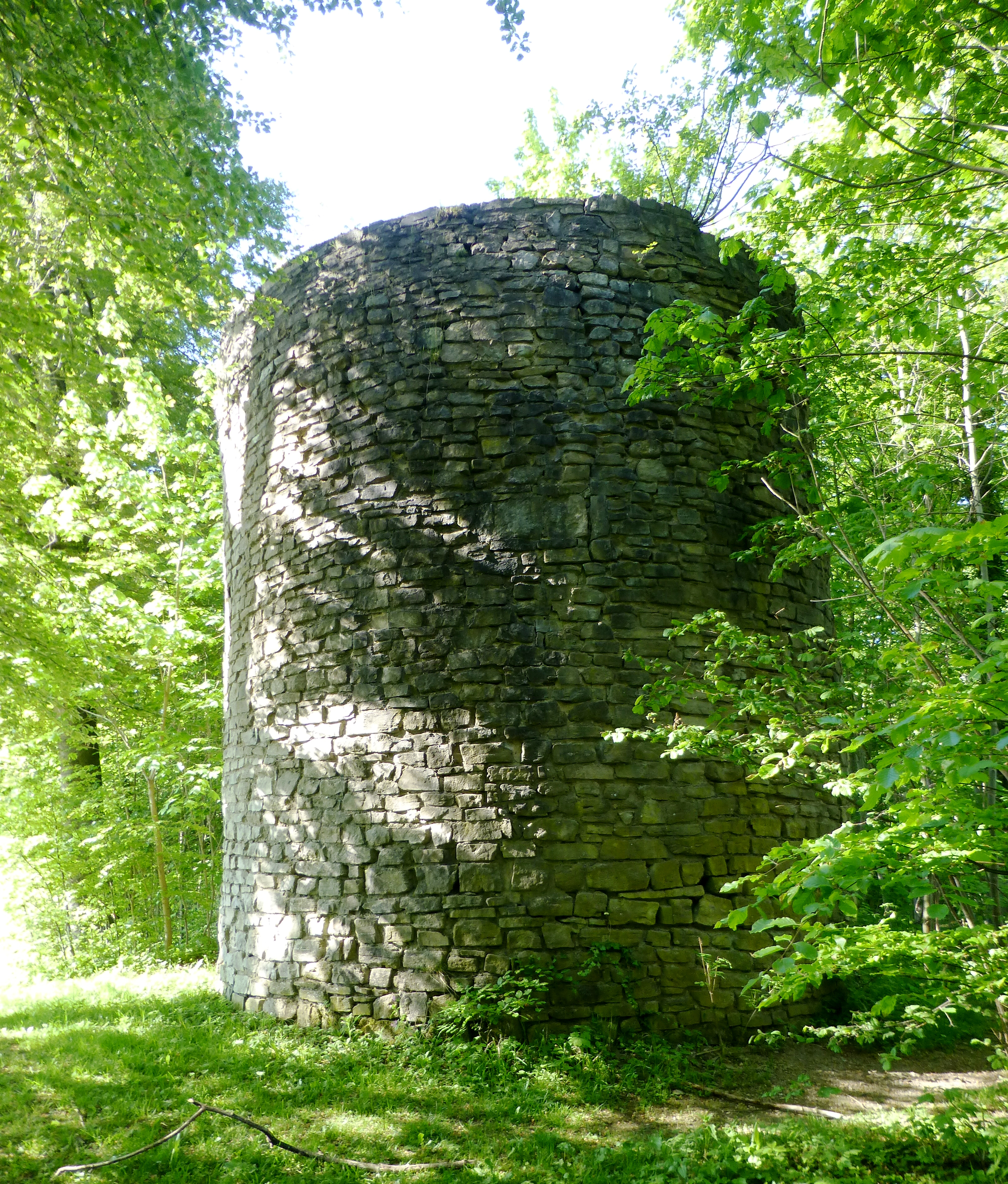 So genannter Galgenturm, Wartturm auf dem Ührder Berg neben der ehemaligen Richtstätte der Stadt Osterode am Harz, Niedersachsen. Erbaut im 13. Jahrhundert